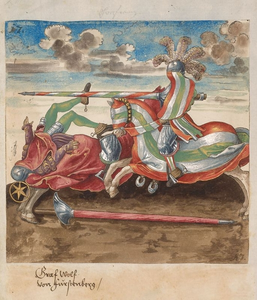 Seite aus dem Turnierbuch „Freydal“, KHM Wien, MS KK5073